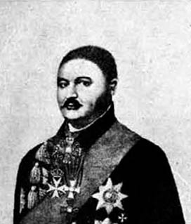 генерал от кавалерии В. П. Орлов